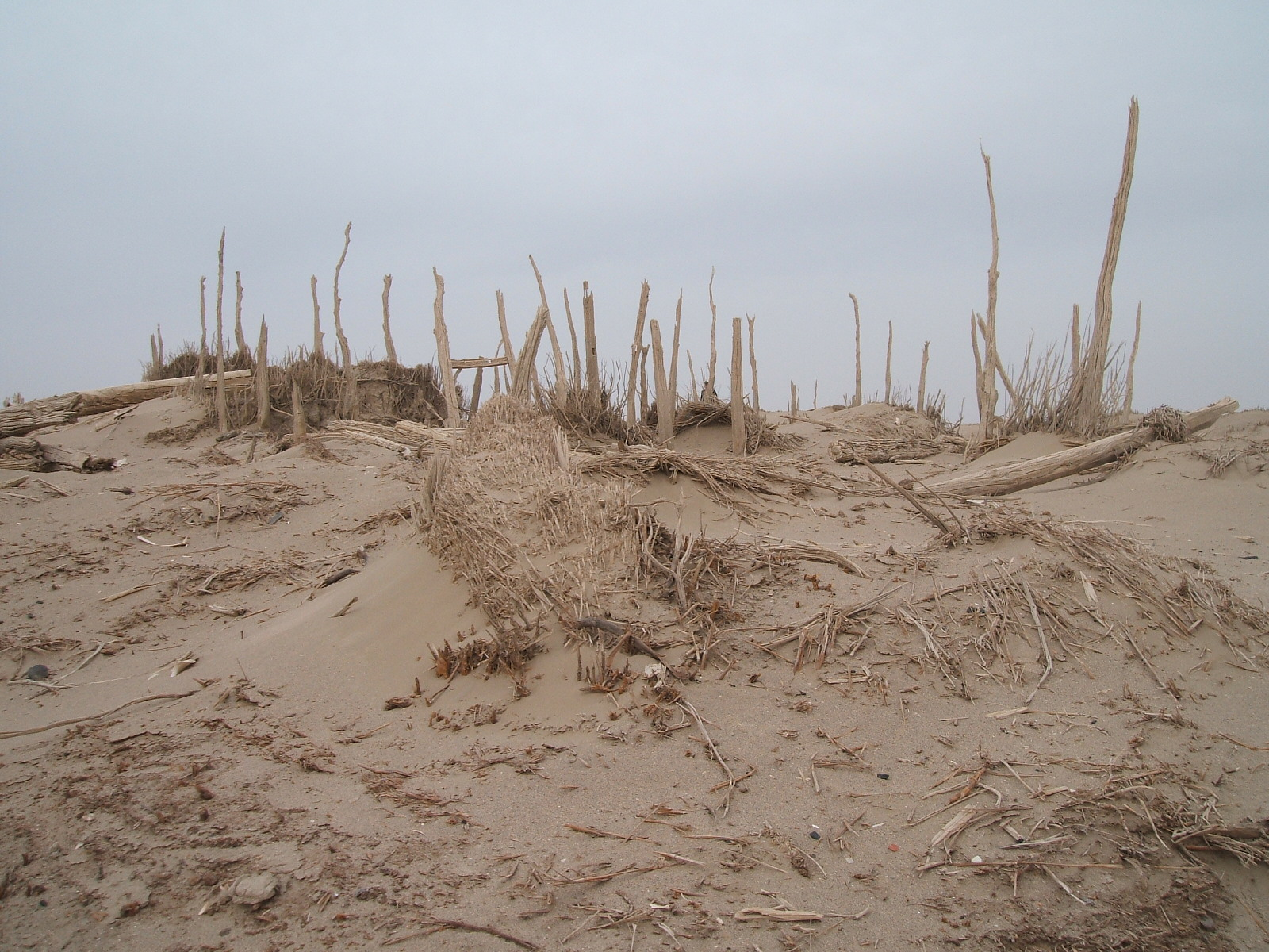 楼兰古城 Loulan city China Xinjiang Urumqi Welcome you to tour the, Китай Синьцзяна Урумчи приветствовать Вас на экскурсию, الصين ترحب زيارتك لاورومتشى فى شينجيانغ, 中国新疆のウルムチへの訪問を歓迎する, 中国新疆乌鲁木齐欢迎您来观光旅游